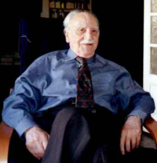 El escritor Francisco Ayala.